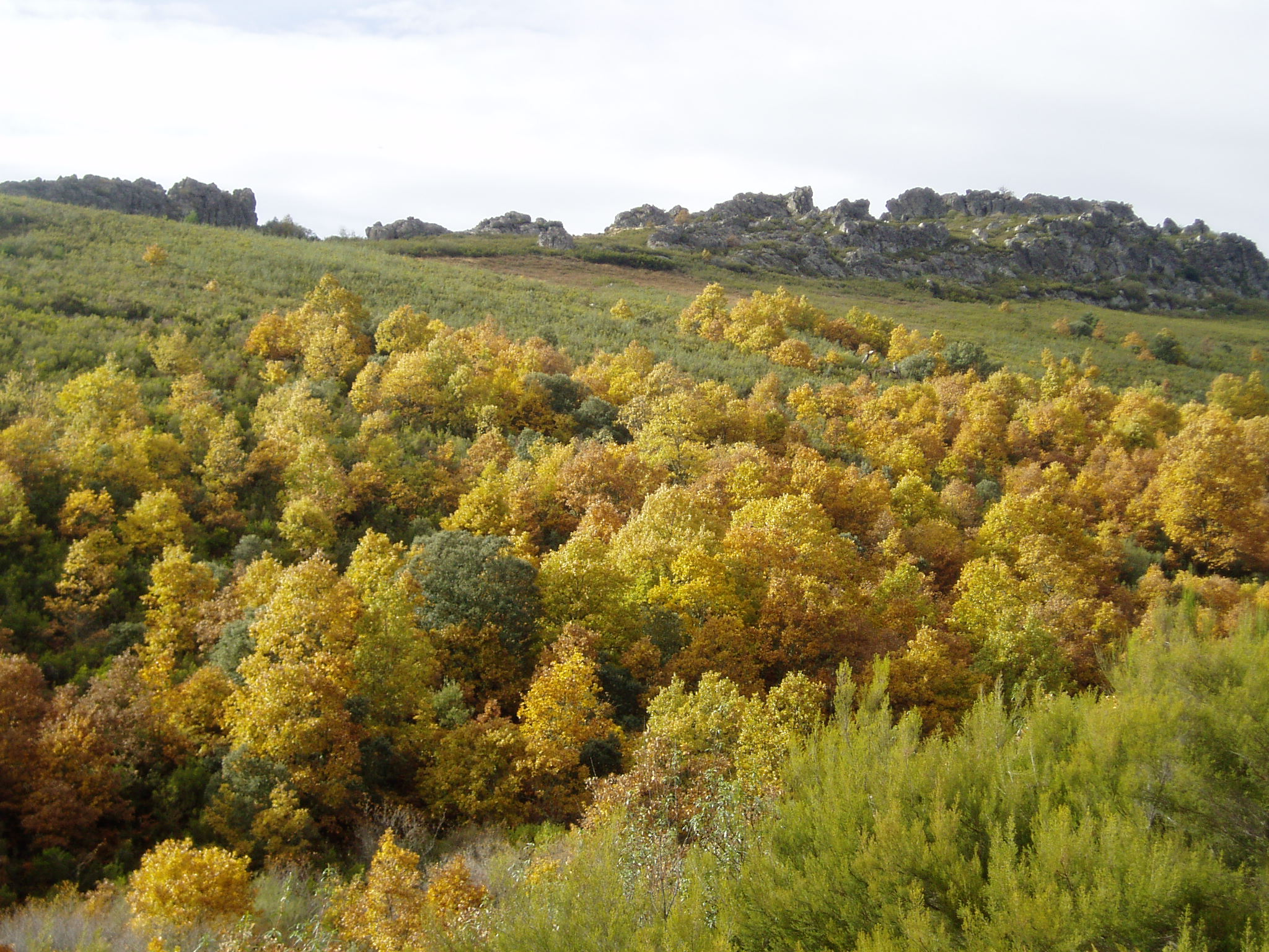 Sierra de la Culebra. This is a photography of a Special Area of Conservation in Spain with the ID: ES4190033. Natura2000 entry, EEA entry